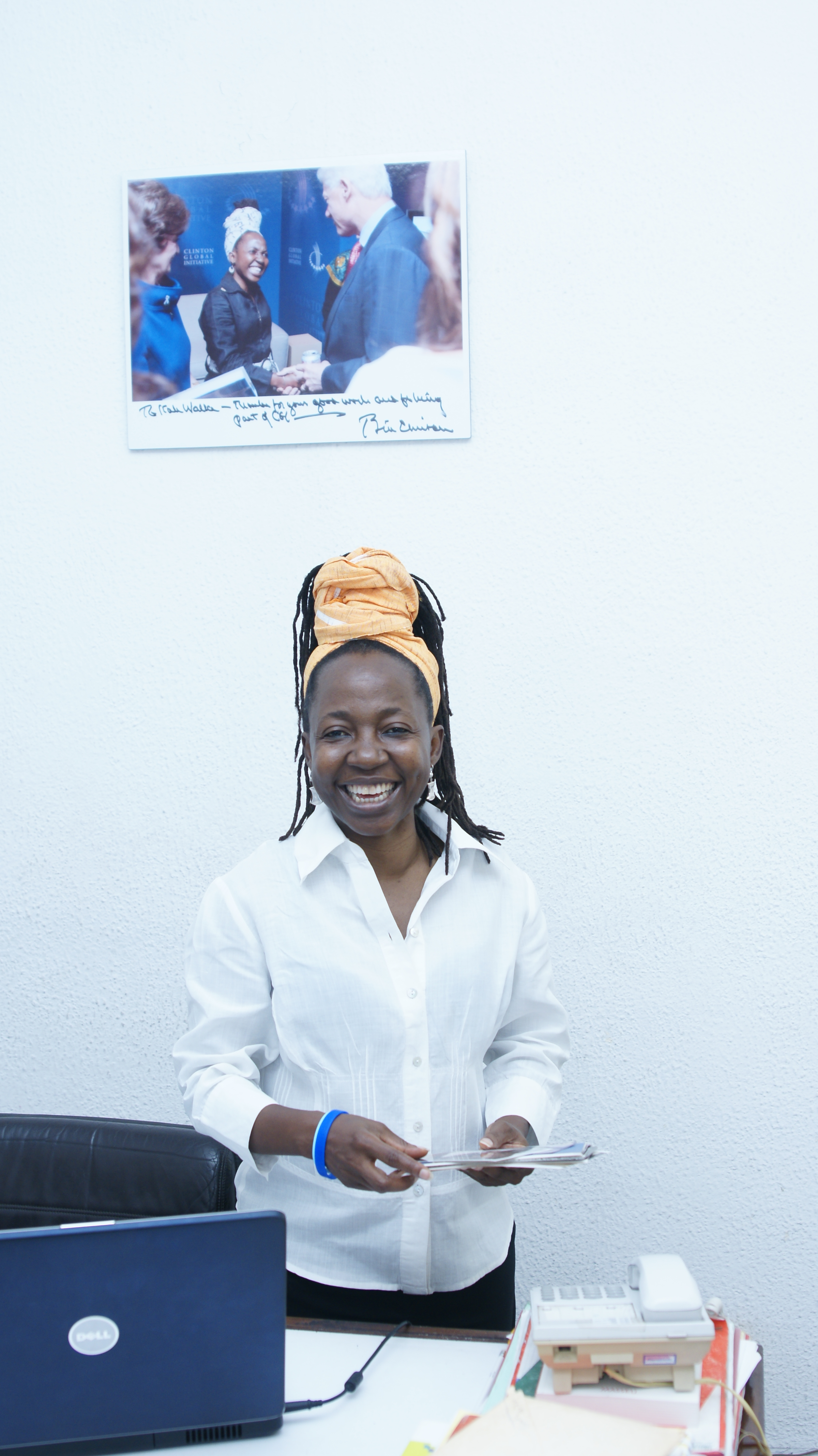 Femme politique camerounaise